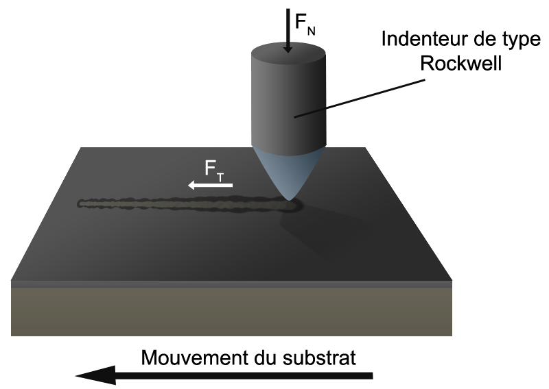 Principe de l'essai scratch Test.